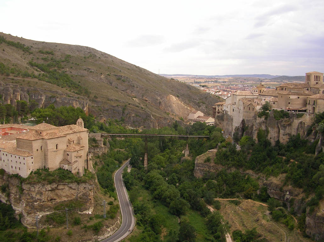 Foto de la Hoz del Huécar